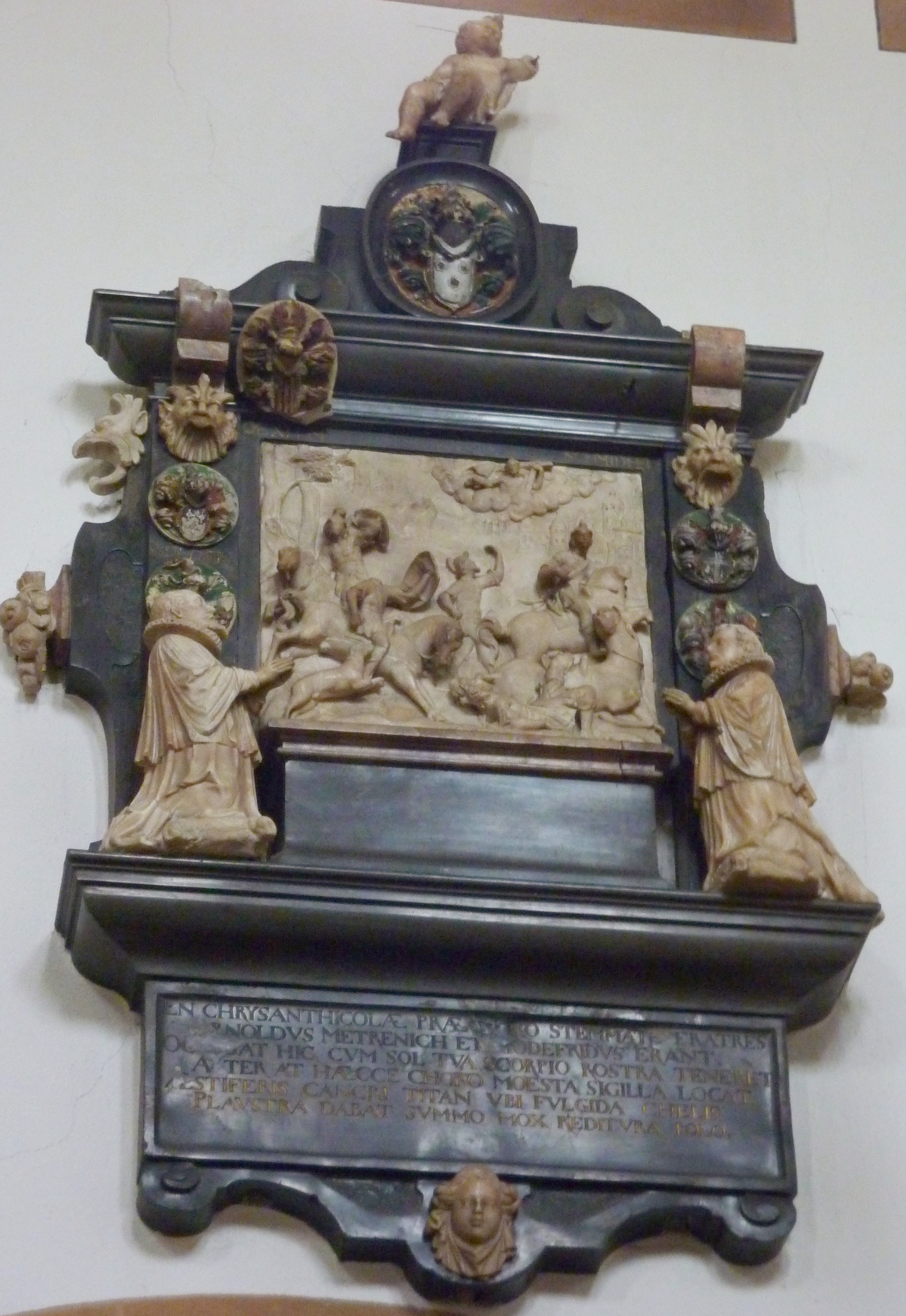 Epitaph in der katholischen Pfarrkirche (Stiftskirche) St. Chrysanthus und Daria in Bad Münstereifel